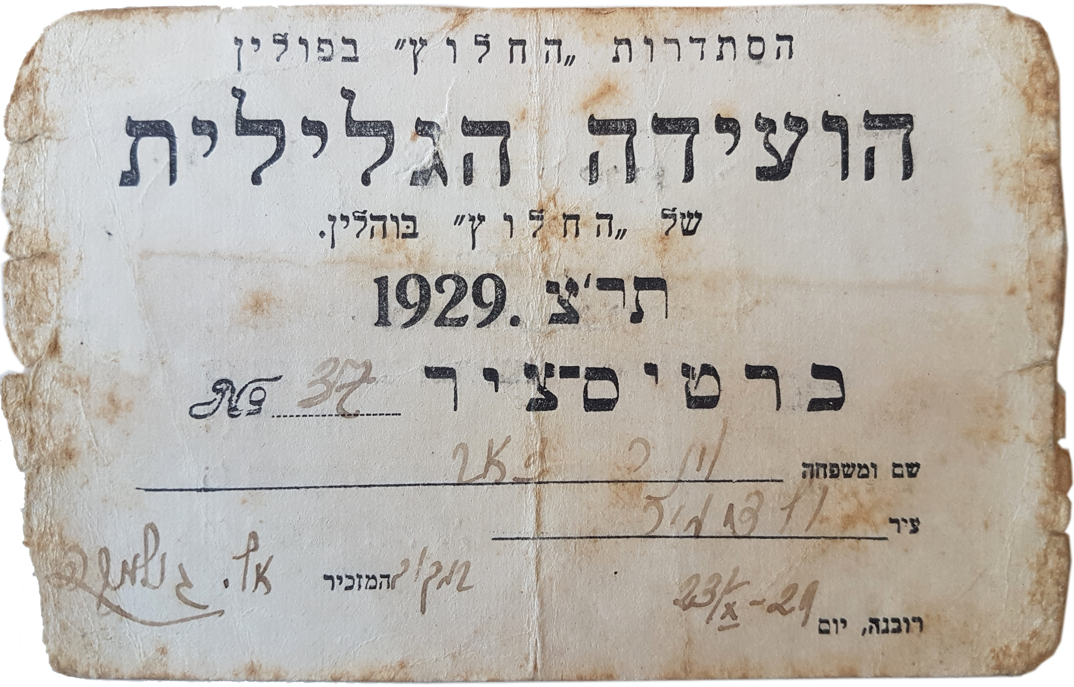 כרטיס ציר של זאב ויינר בועידה הגלילית בוהלין 1929